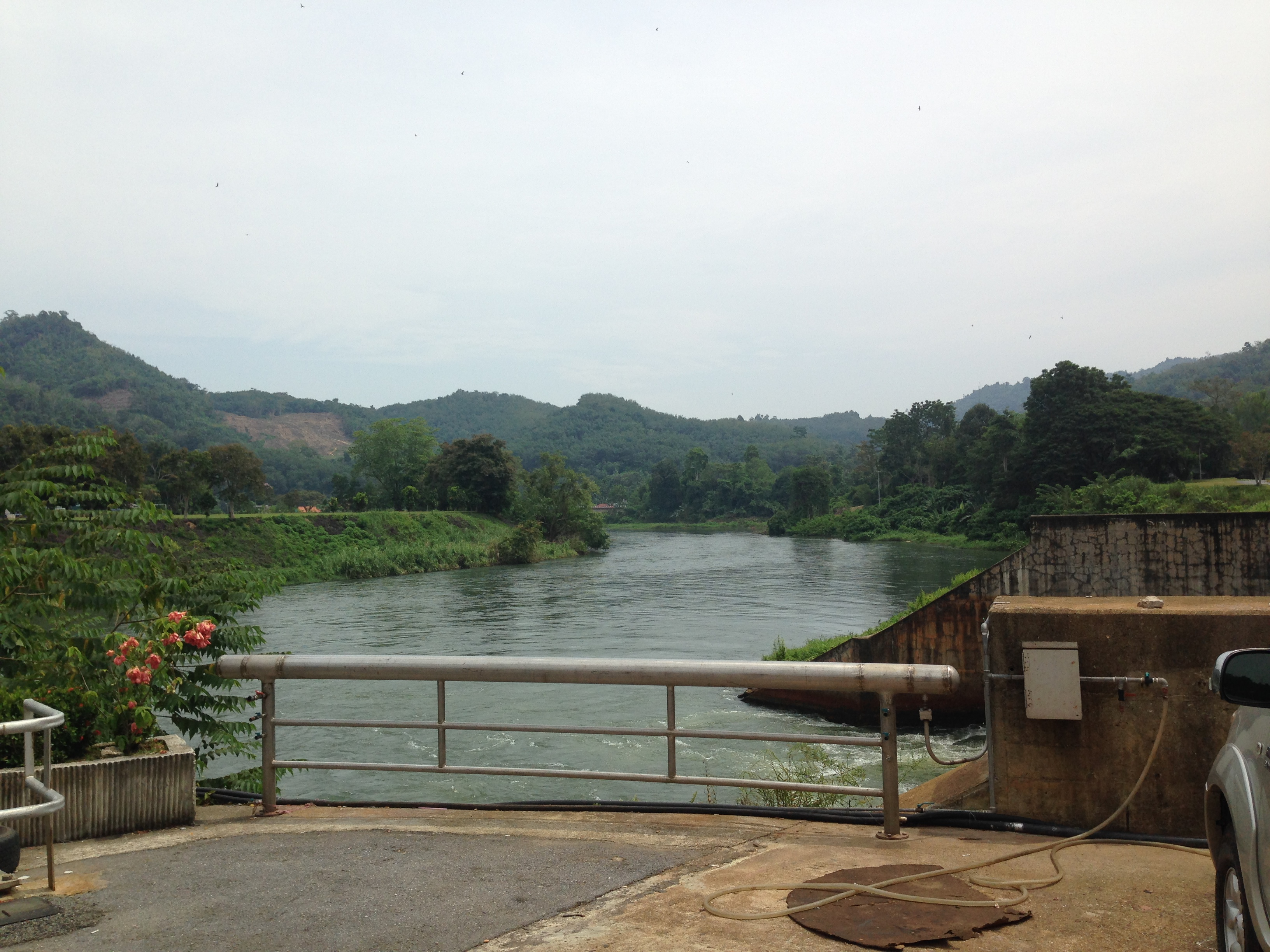 Khuean Bang Lang, Bannang Sata District, Yala, Thailand